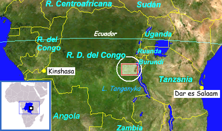 Mapa del Congo y los países vecinos. Zona en la que actuó el Che Guevara en 1965.